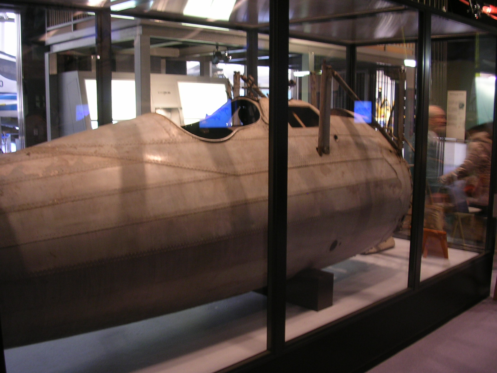 九一式戦闘機二型 / Nakajima Type 91